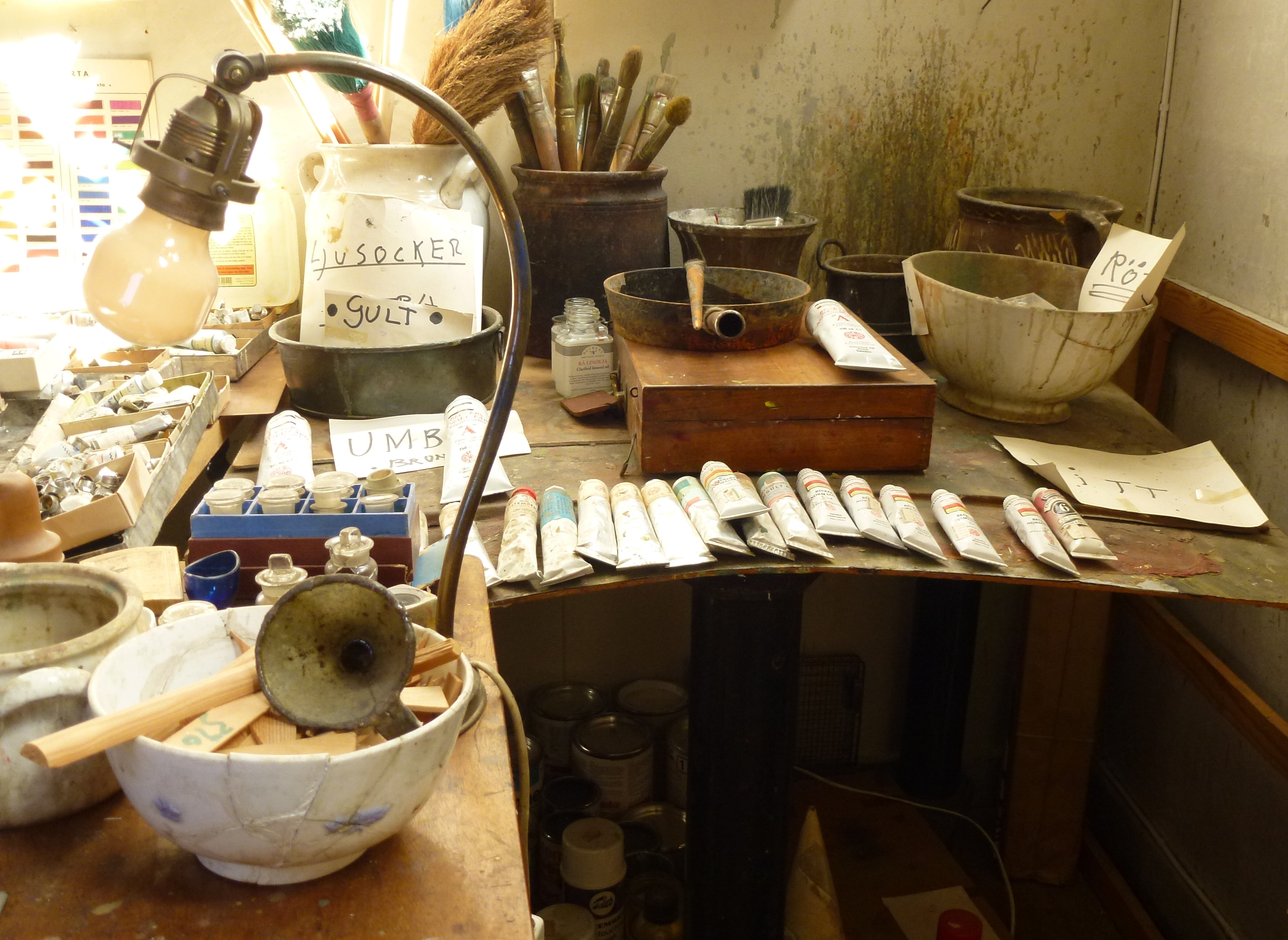 Evert Lundquists ateljé 2012